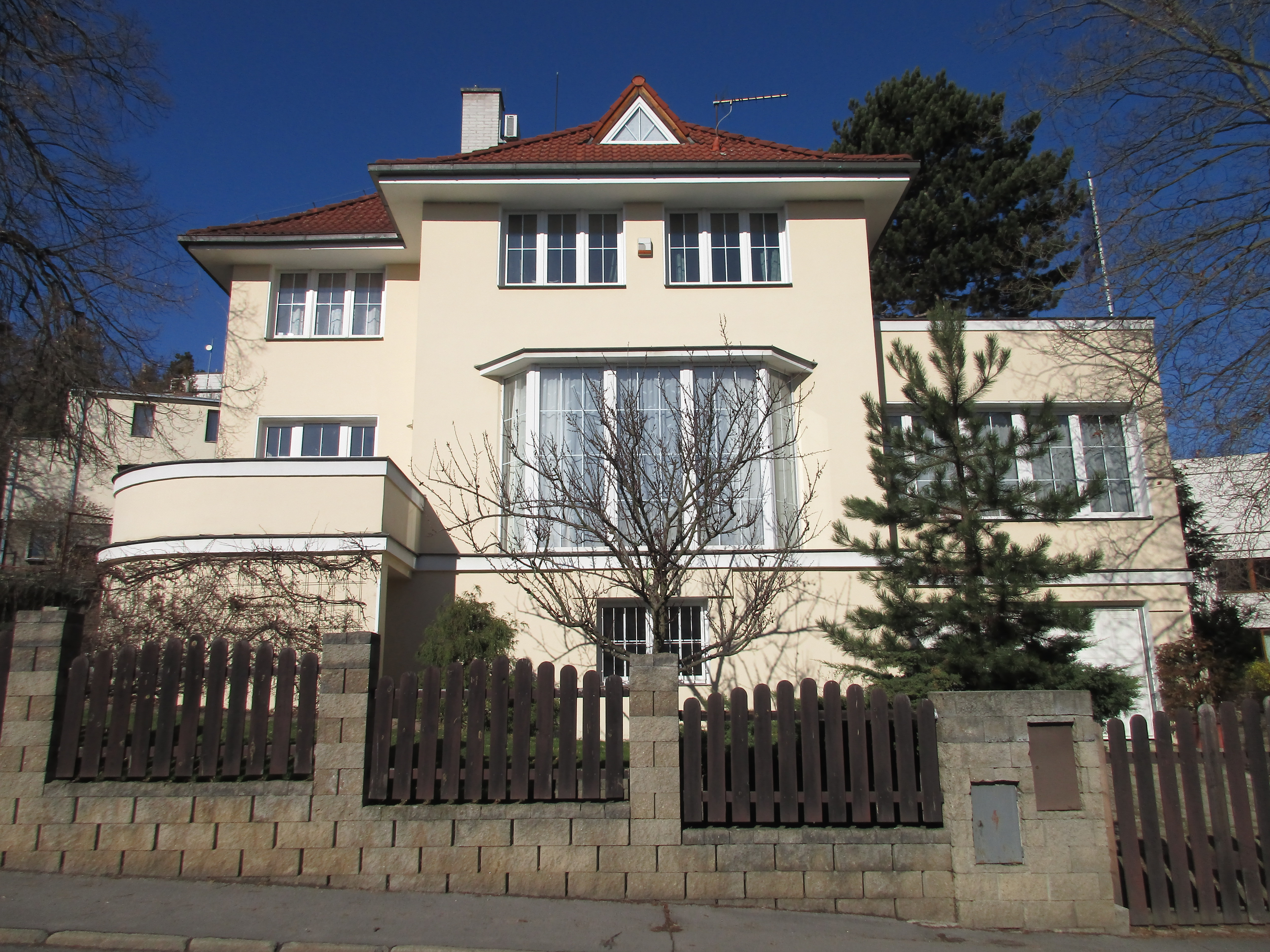 Barrandovská 158/14, Praha 5-Hlubočepy. Arch. Antonín Hloušek, František Niklas, 1928-1930.